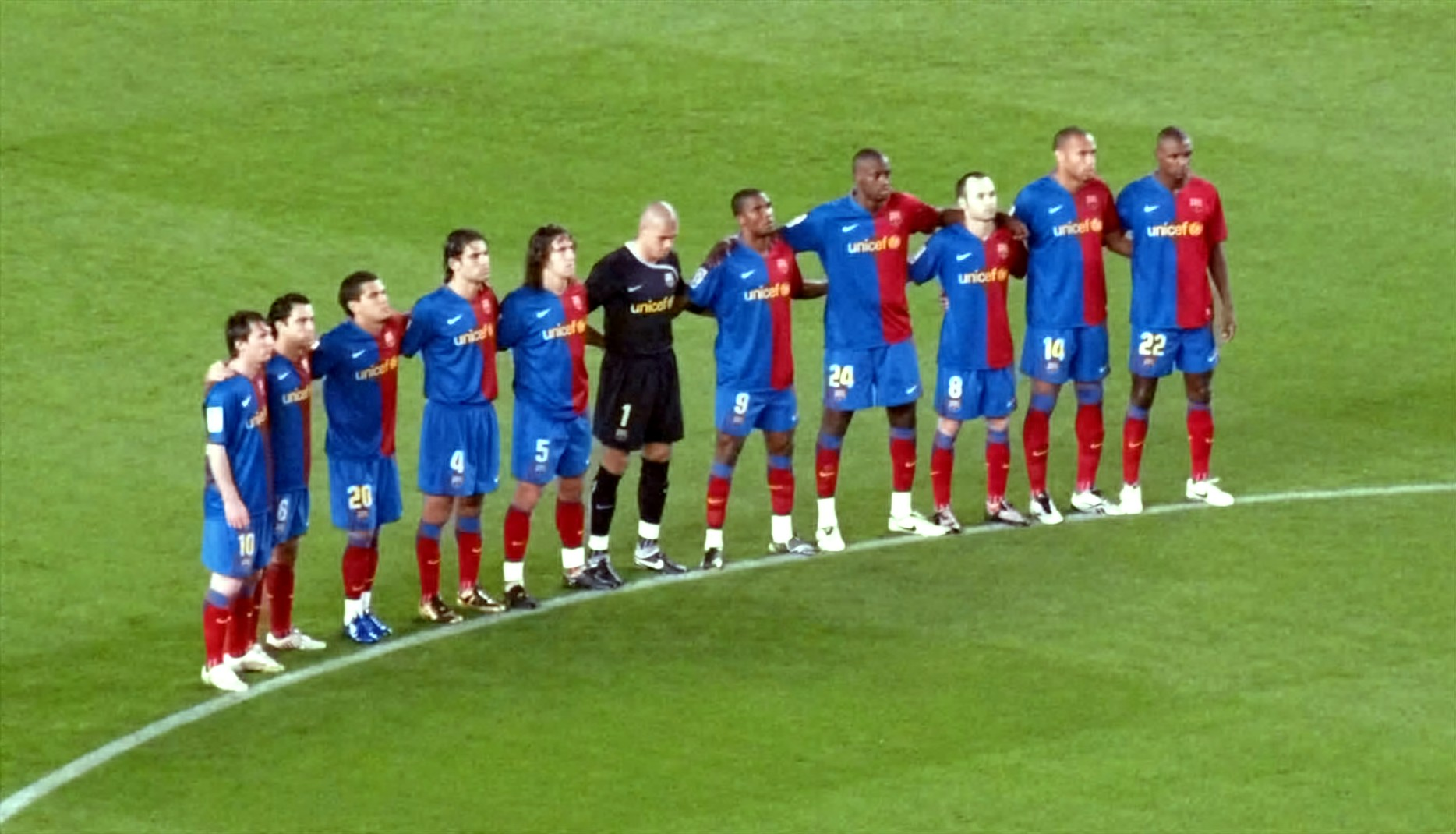 Alineación titular del FC Barcelona, momentos antes de iniciar el partido que les enfrentó al Almería en la primera vuelta de la temporada 2008-09. De izquierda a derecha: Lionel Messi, Xavi Hernández, Daniel Alves, Rafael Márquez, Carles Puyol, Víctor Valdés, Samuel Eto'o, Yaya Touré, Andrés Iniesta Luján, Thierry Henry y Éric Abidal.